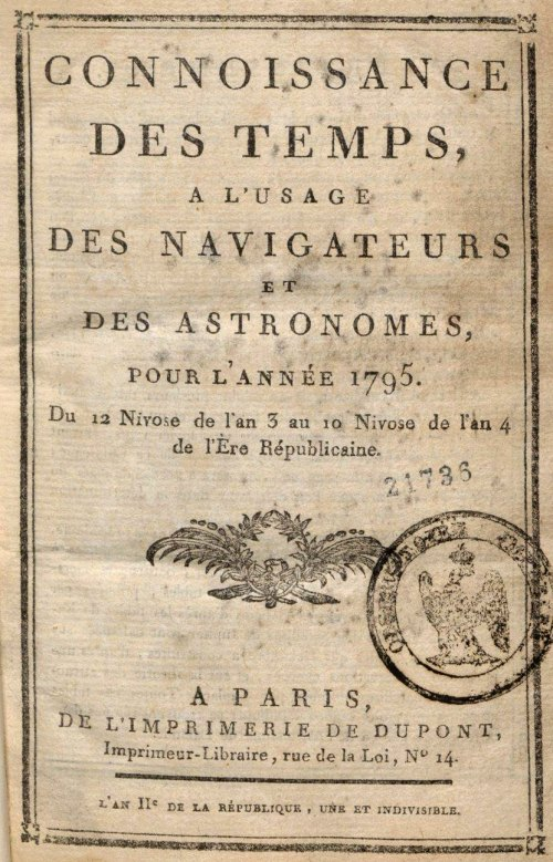 Page de garde connaissance des temps, 1795